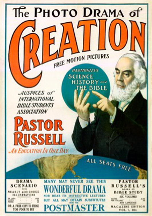 Αφίσα για την Προβολή του Φωτοδράματος